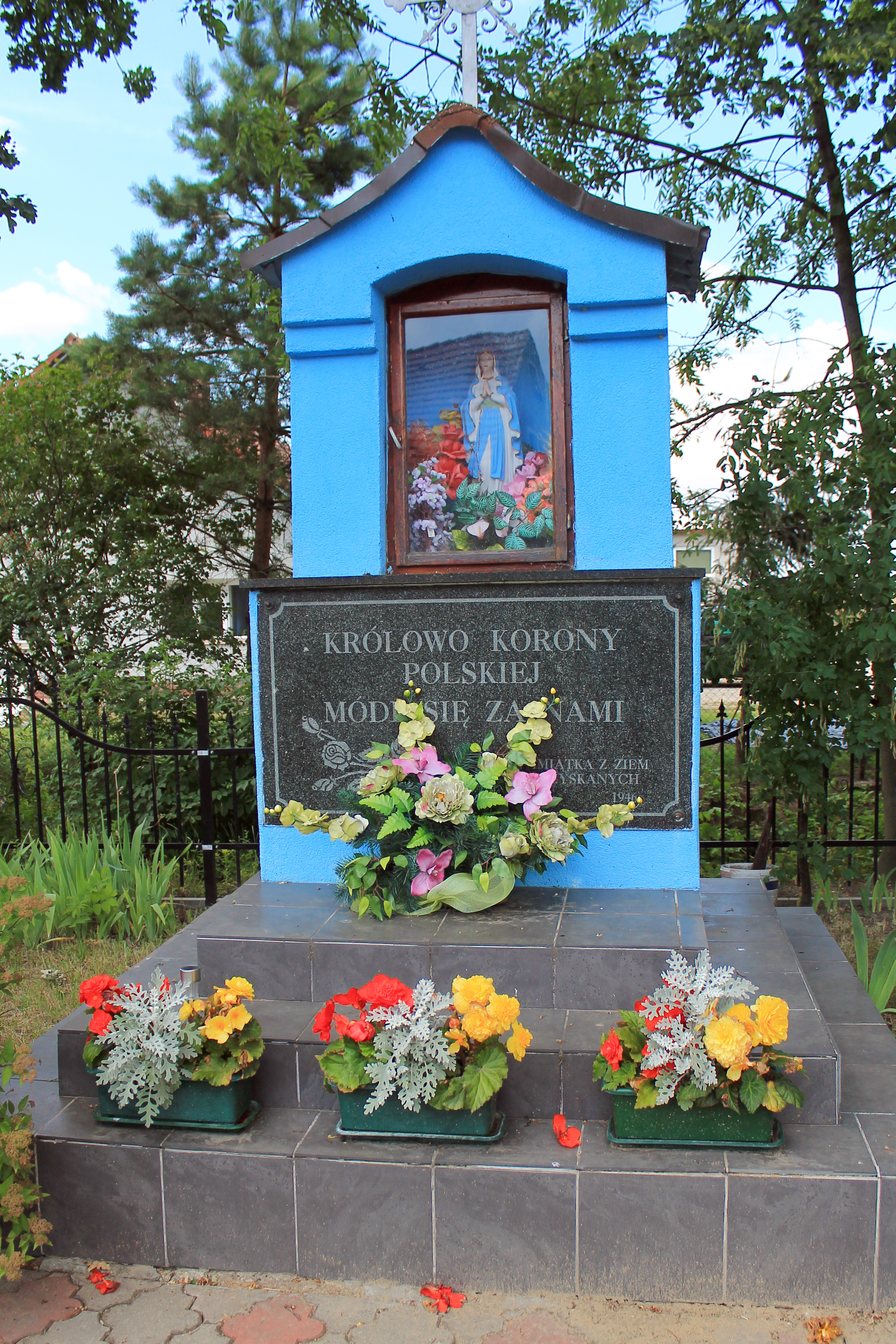 Modlęcin, gmina Strzegom. Kapliczka przydrożna poświęcona Matce Boskiej.